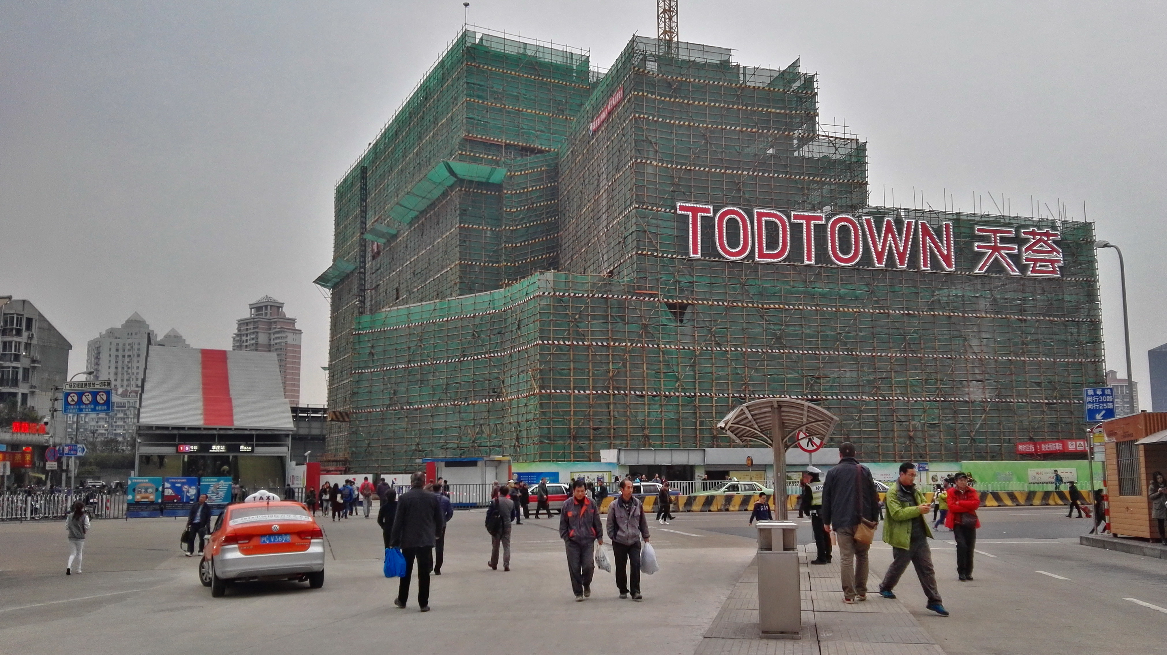 正在改造的莘庄站南广场区域